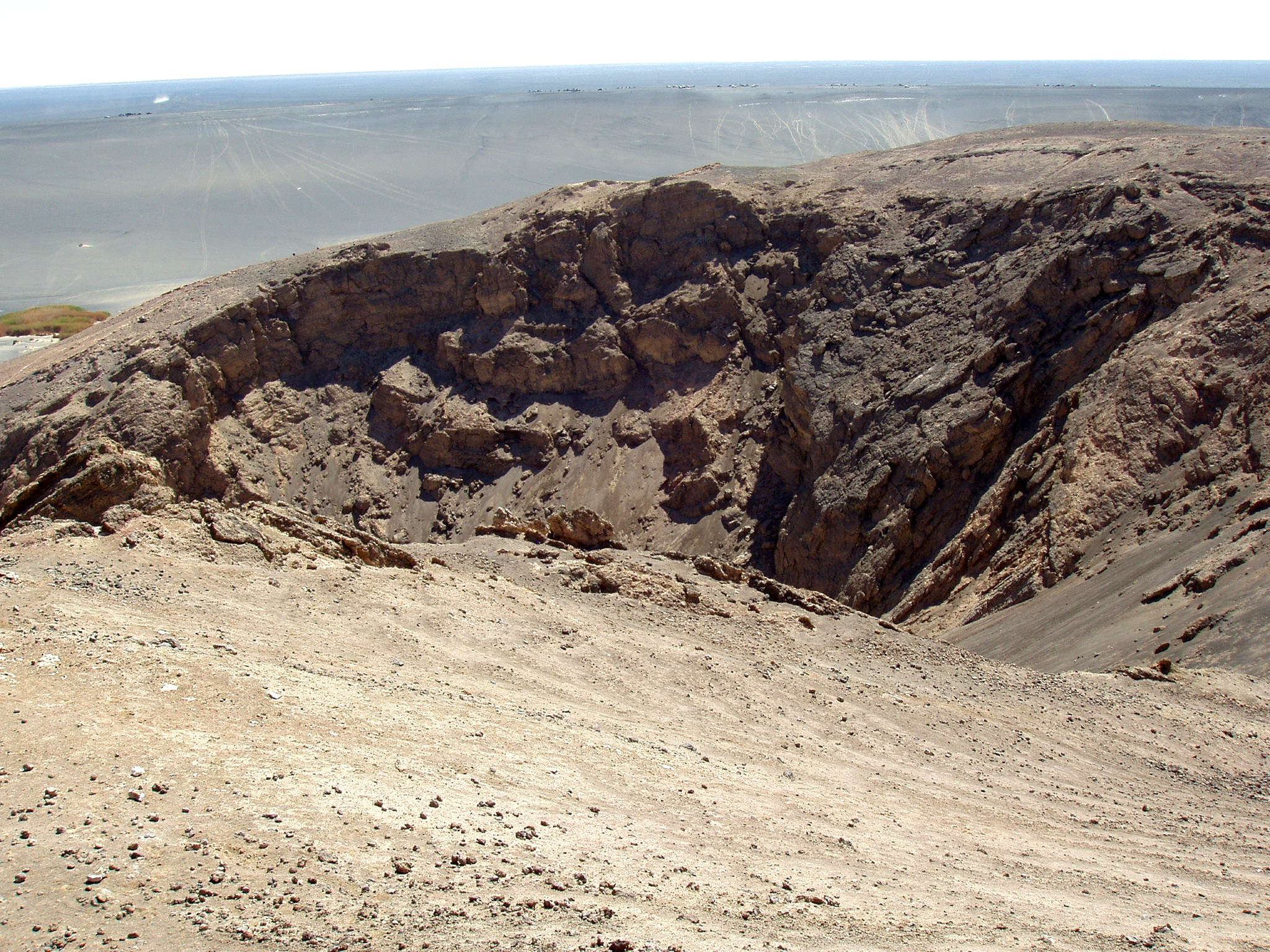 Der zentrale Krater vom Waw an Namus